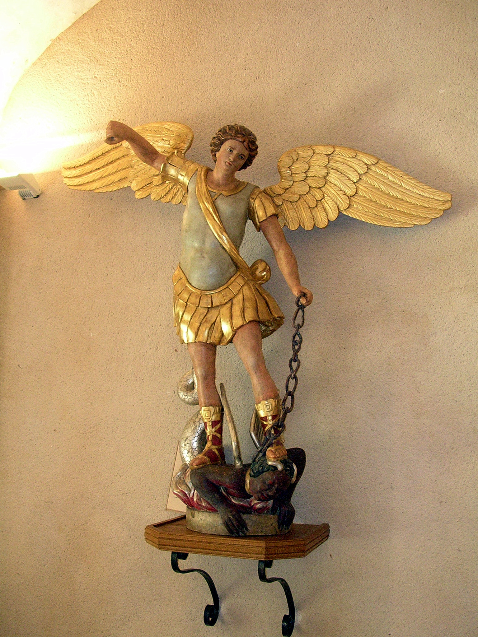 Abbaye bénédictine de Saint-Sever, dans les Landes (France) : l'archange Saint Michel Photo prise par Jibi44 en juillet 2006